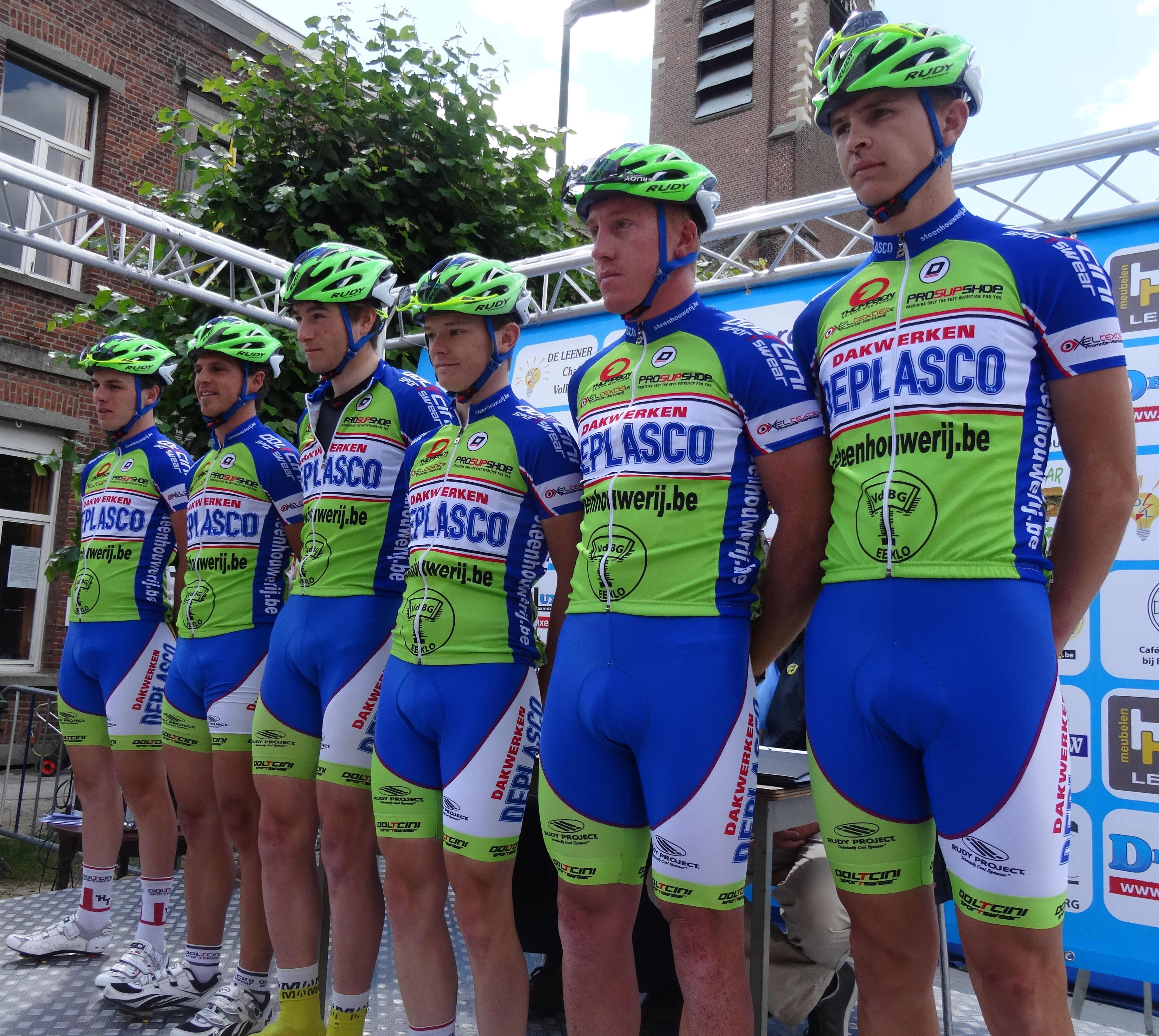 Reportage photographique réalisé le mercredi 25 juin à l'occasion du départ et de l'arrivée de l'Internationale Wielertrofee Jong Maar Moedig 2014 à Oetingen (Gooik), Belgique.